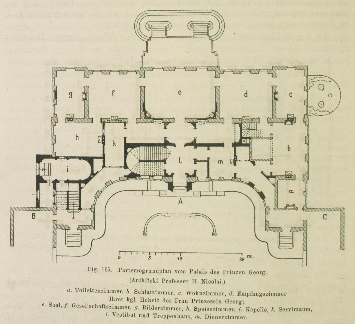 siehe Bildtext aus: Die Bauten, technischen und industriellen Anlagen von Dresden. Herausgegeben vom Sächs. Ingenieur- und Architekten-Verein und vom Dresdener Architekten-Verein. Meinhold, Dresden 1878